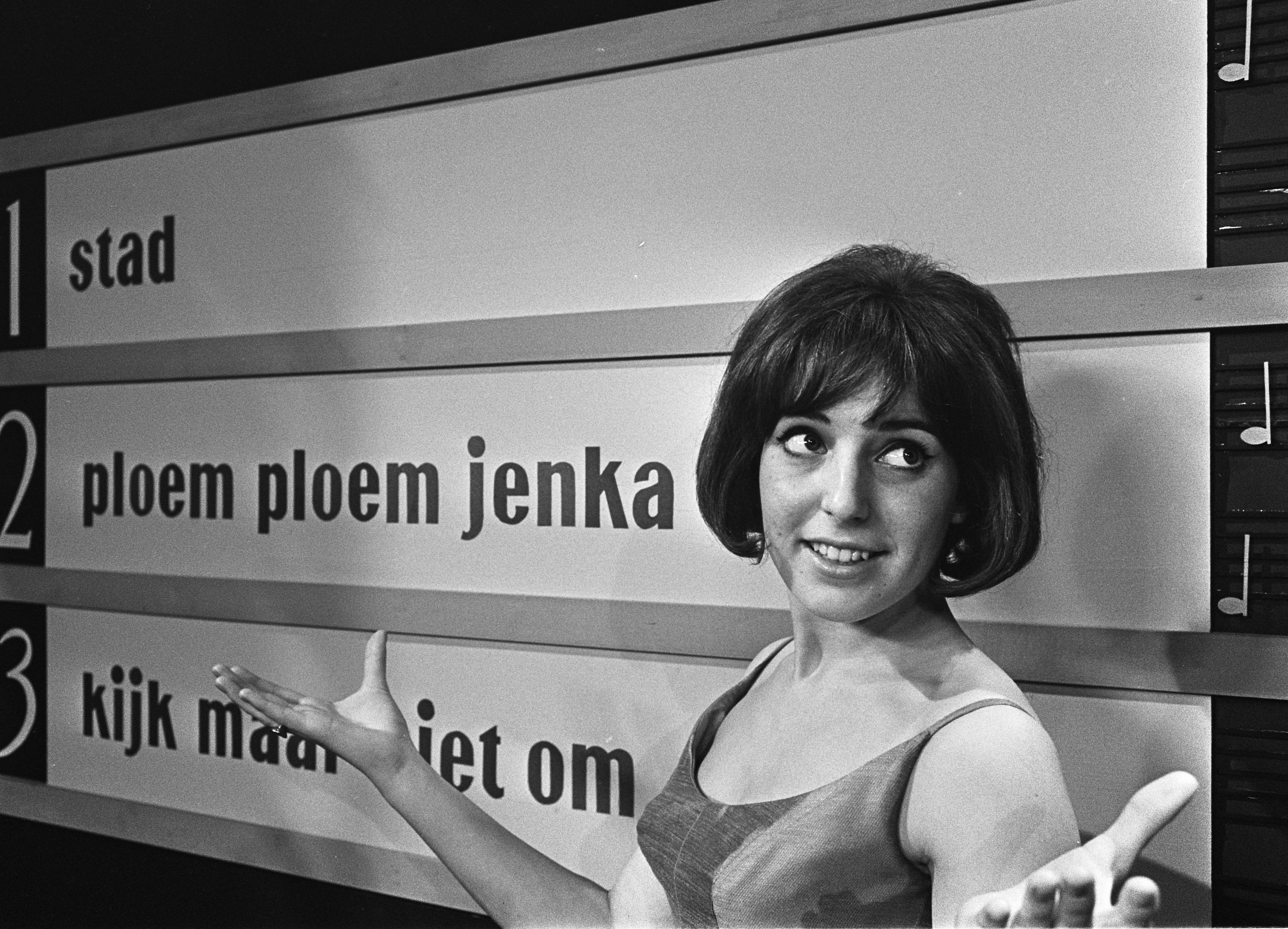 Collectie / Archief : Fotocollectie Anefo Reportage / Serie : [ onbekend ] Beschrijving : Voorronde finale Nationaal Songfestival 1965, Trea Dobbs voor bord met namen van liedjes Datum : 8 februari 1965 Trefwoorden : songfestivals, zangeressen Persoonsnaam : Dobbs, Trea Instellingsnaam : Nationaal Songfestival Fotograaf : Koch, Eric / Anefo Auteursrechthebbende : Nationaal Archief Materiaalsoort : Negatief (zwart/wit) Nummer archiefinventaris : bekijk toegang 2.24.01.05 Bestanddeelnummer : 917-4101